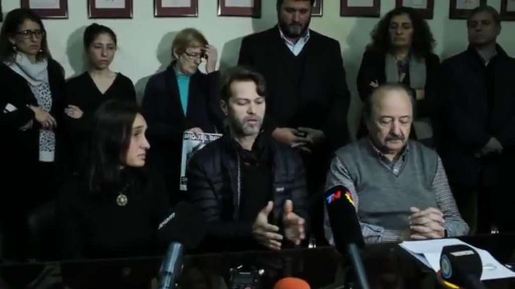 Conferencia de Prensa realizada por el hermano de Santiago Maldonado (Germán Maldonado), Comisión Provincial por la Memoria, Asamblea Permanente por los Derechos Humanos, Familiares de Detenidos Desaparecidos, Ceprode, CELS, Liga Argentina por los Derechos del Hombre, entre otros, el 4 de agosto de 2017.